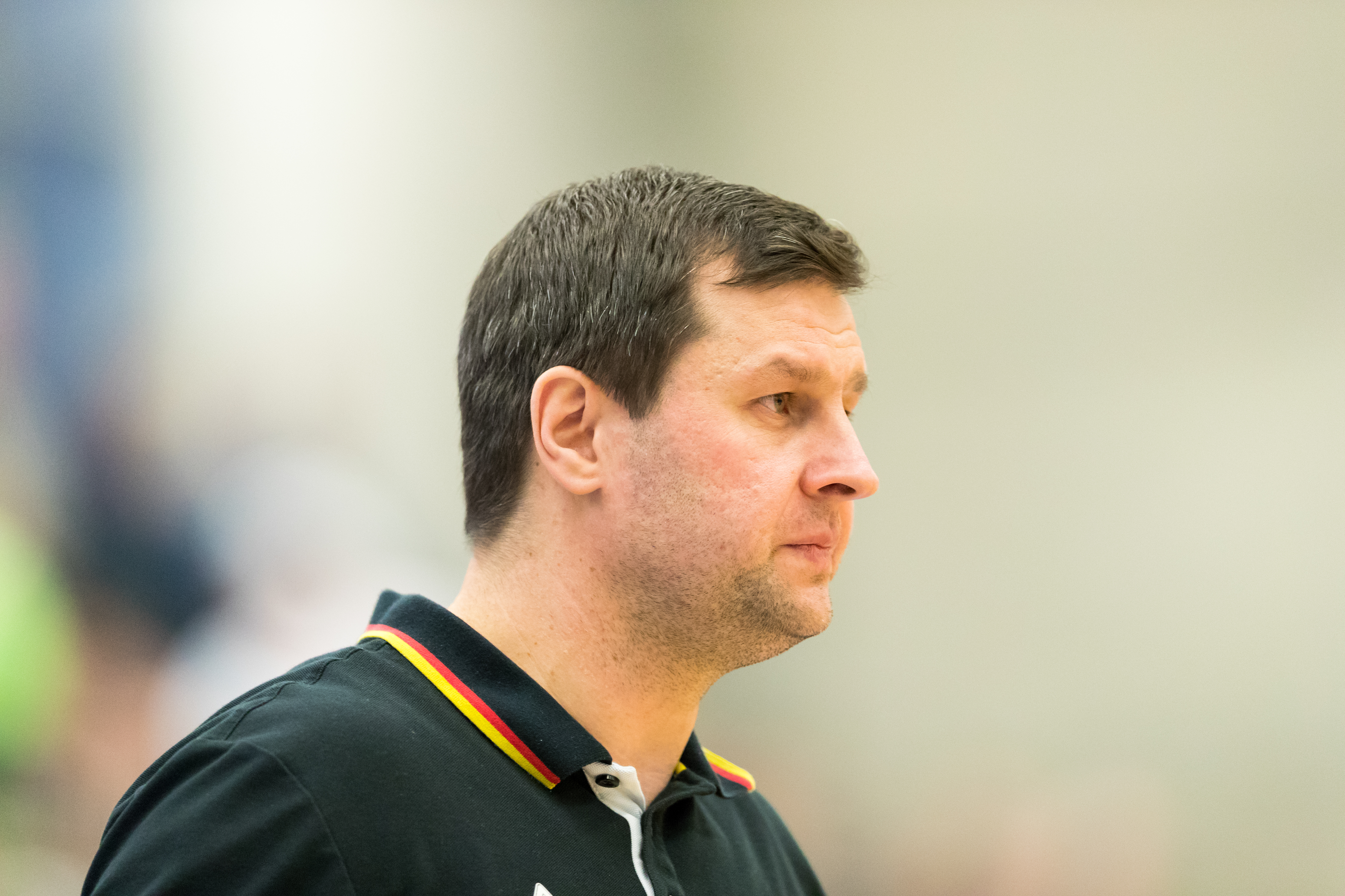 Germany vs Turkey 74:70 during Basketball Albert Schweitzer Turnier at GBG Halle, Mannheim, Baden-Württemberg, Germany on 2018-04-02, Photo: Sven Mandel